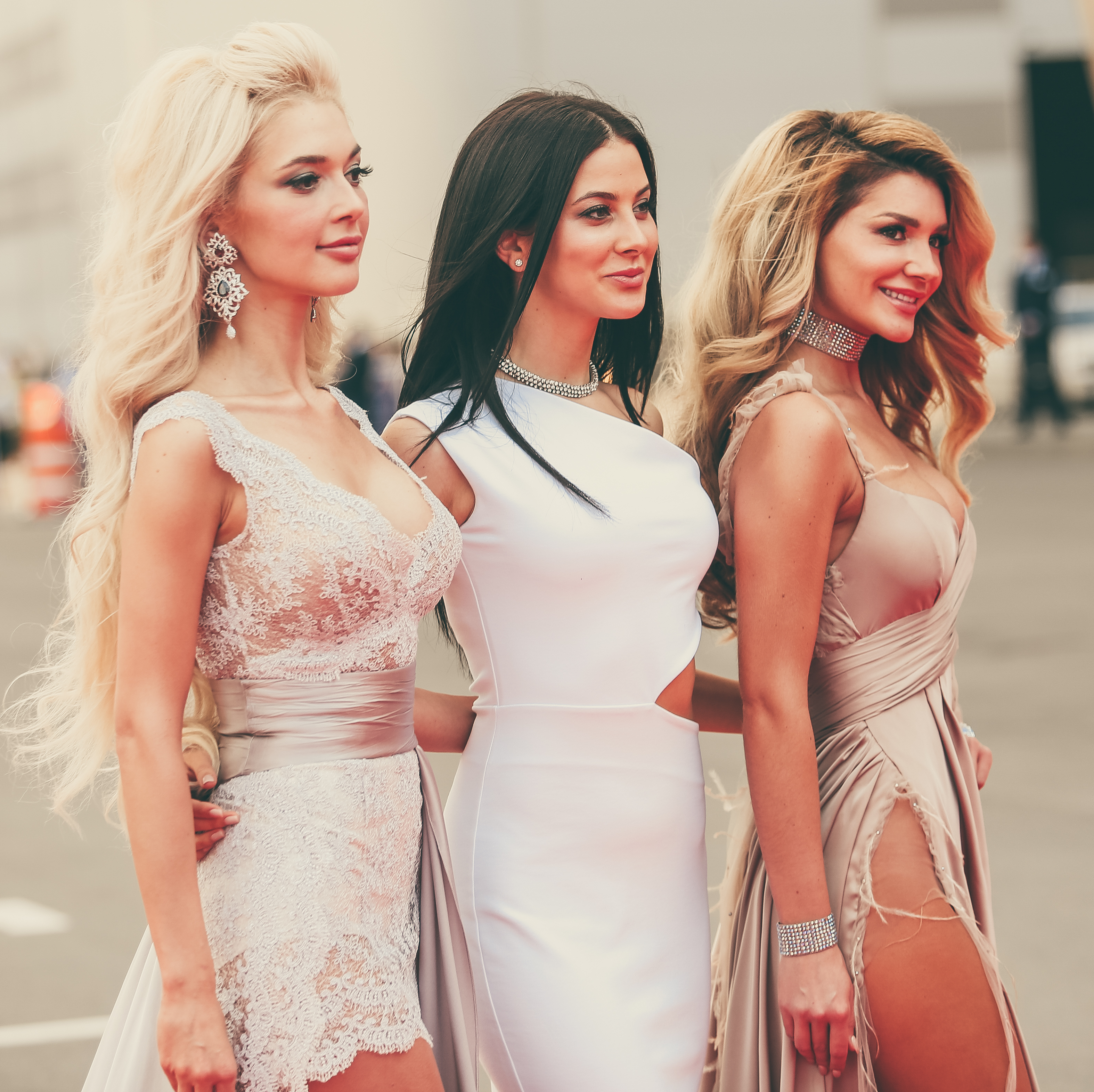 Группа «ВИА Гра» на премии телеканала «RU.TV 2016» в Москве